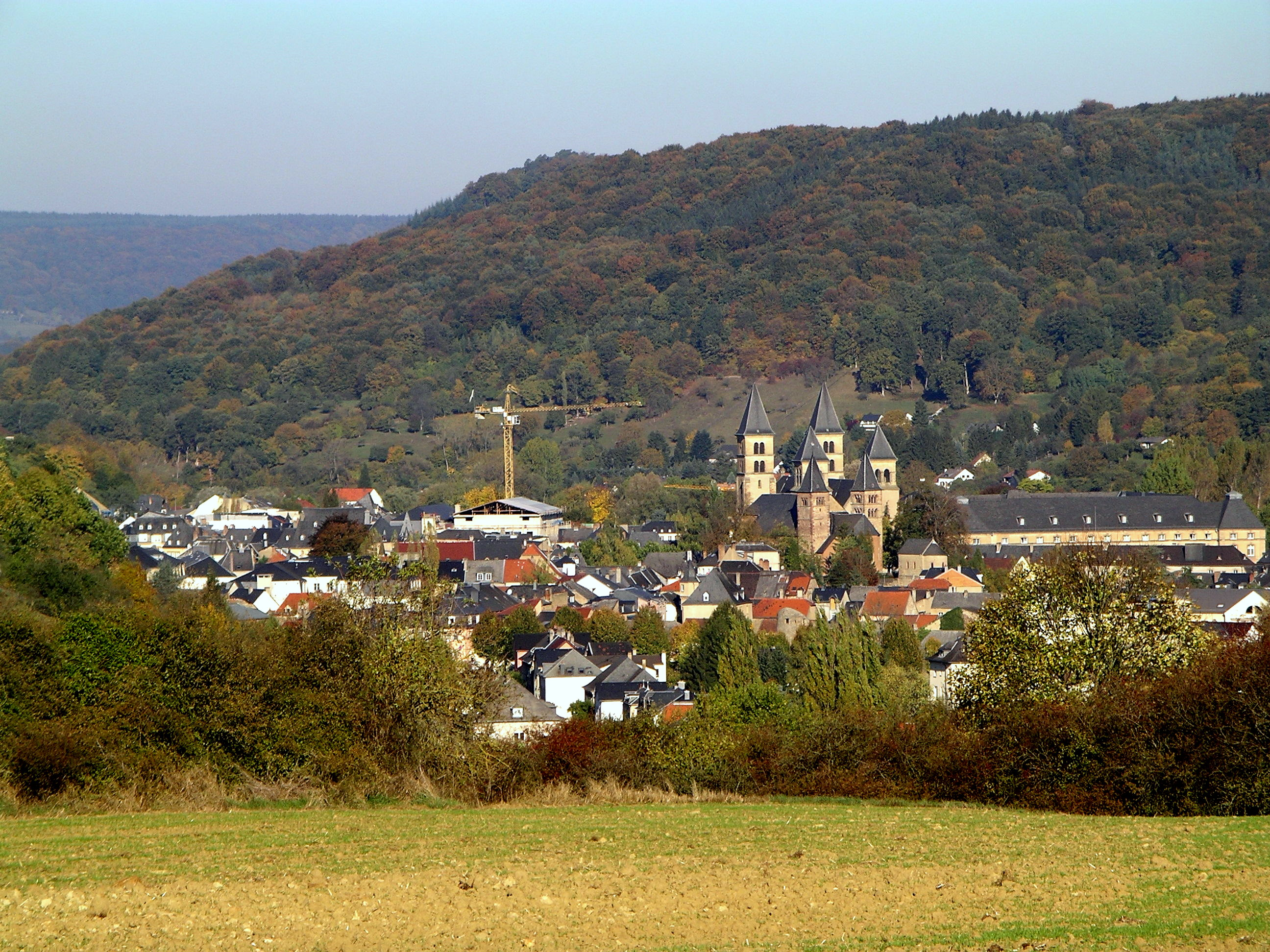 Blick auf Echternach an der Sauer